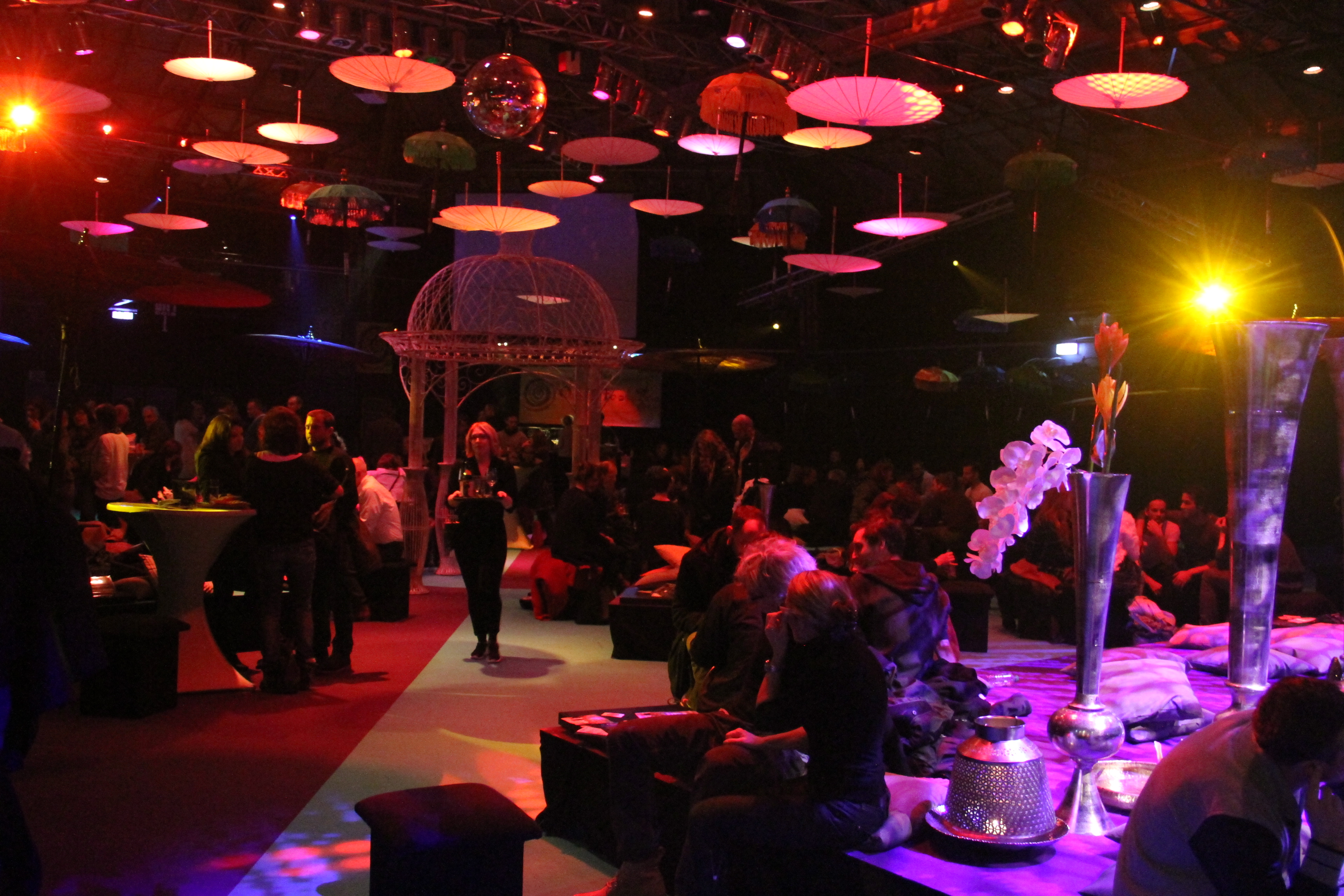 Treffpunkt "Garage" auf dem Max-Ophüls-Filmfestival 2015